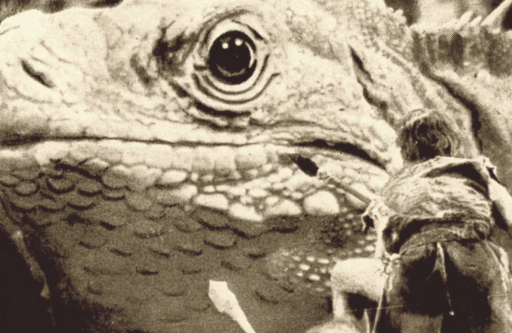 Cena do filme One Million B. C. (1940)